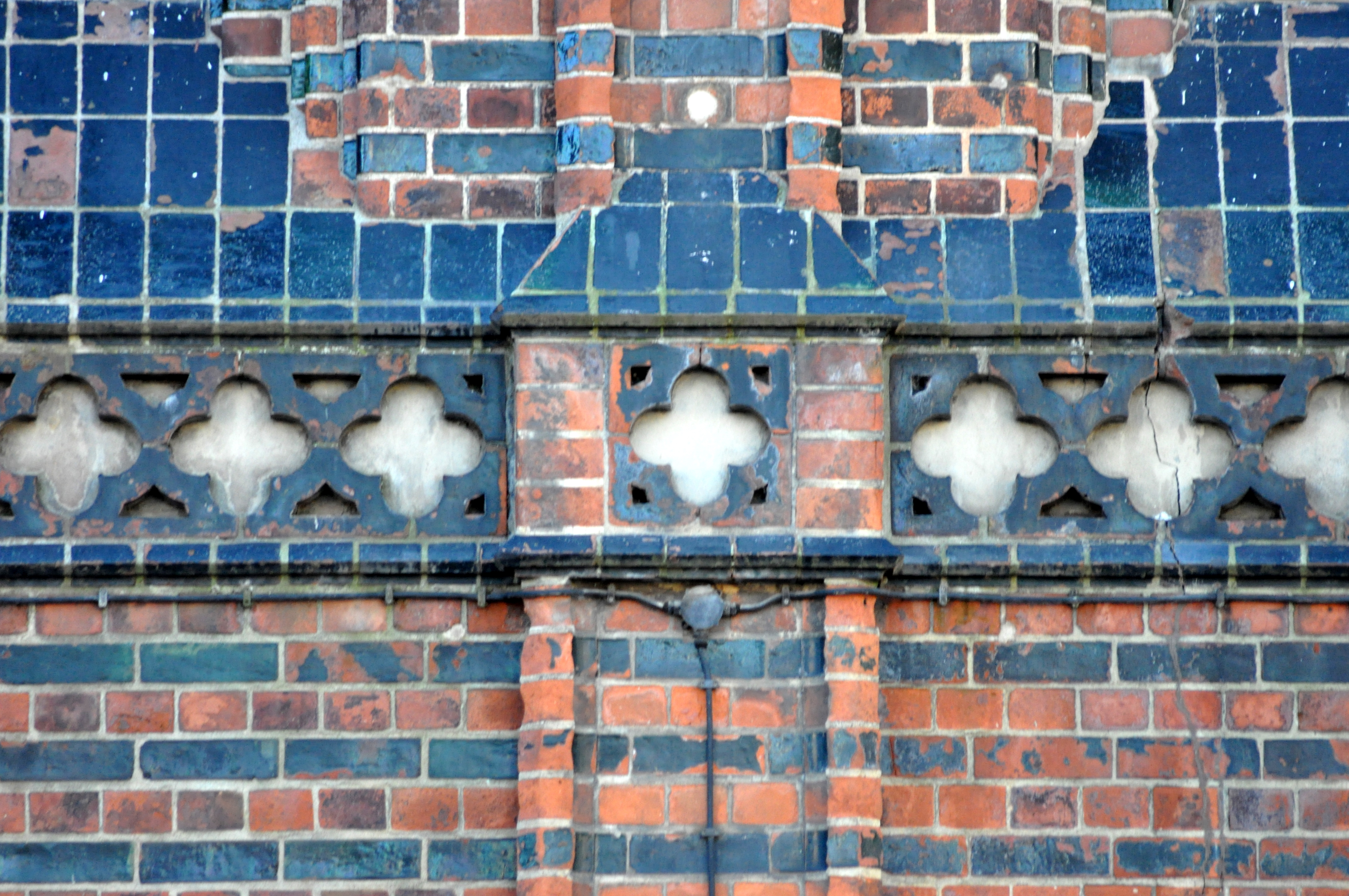 Detail am Stralsunder Rathaus, hier: Backsteine.